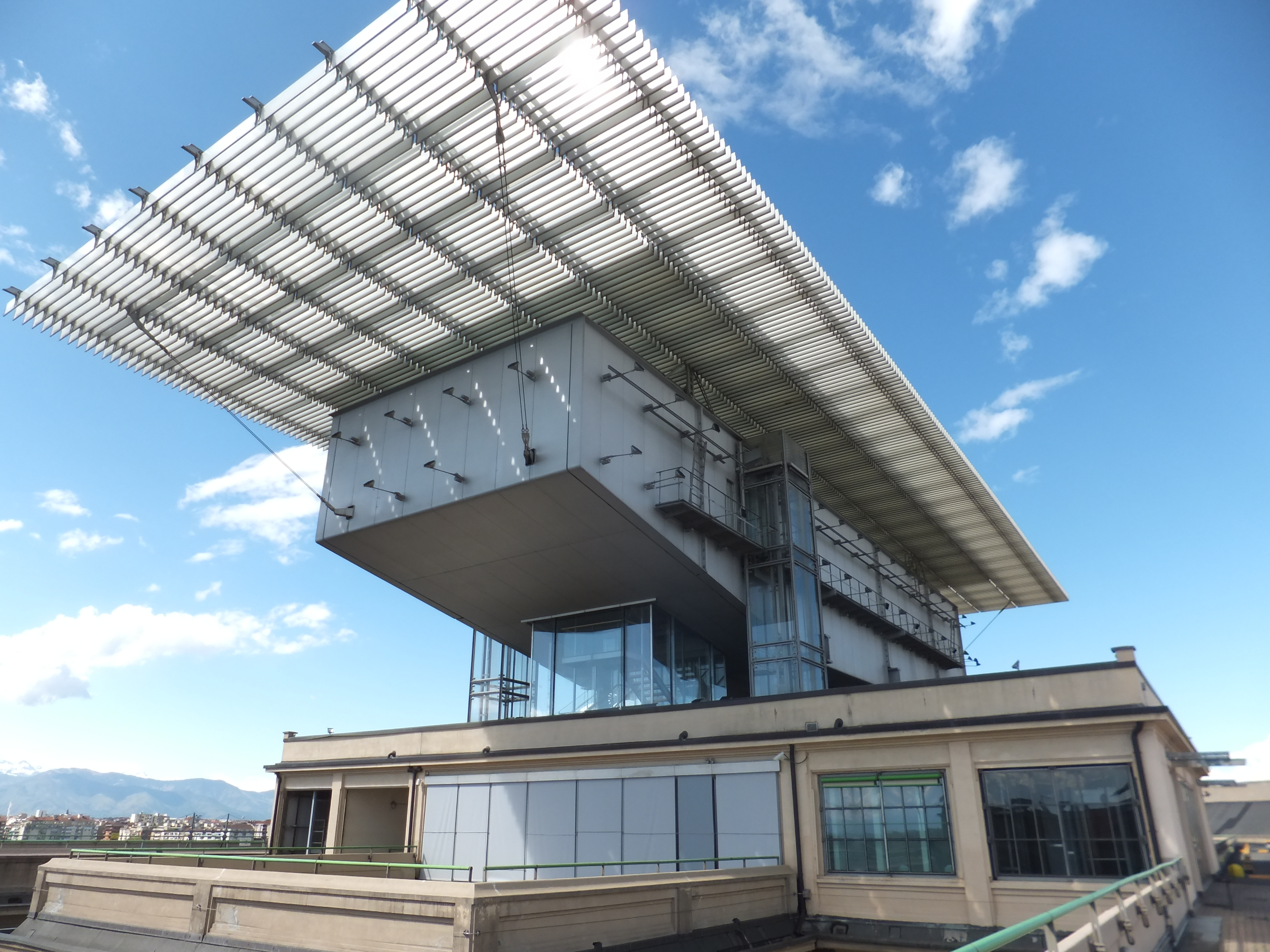 La Pinacoteca Giovanni e Marella Agnelli (progetto R. Piano) This is a photo of a monument which is part of cultural heritage of Italy.